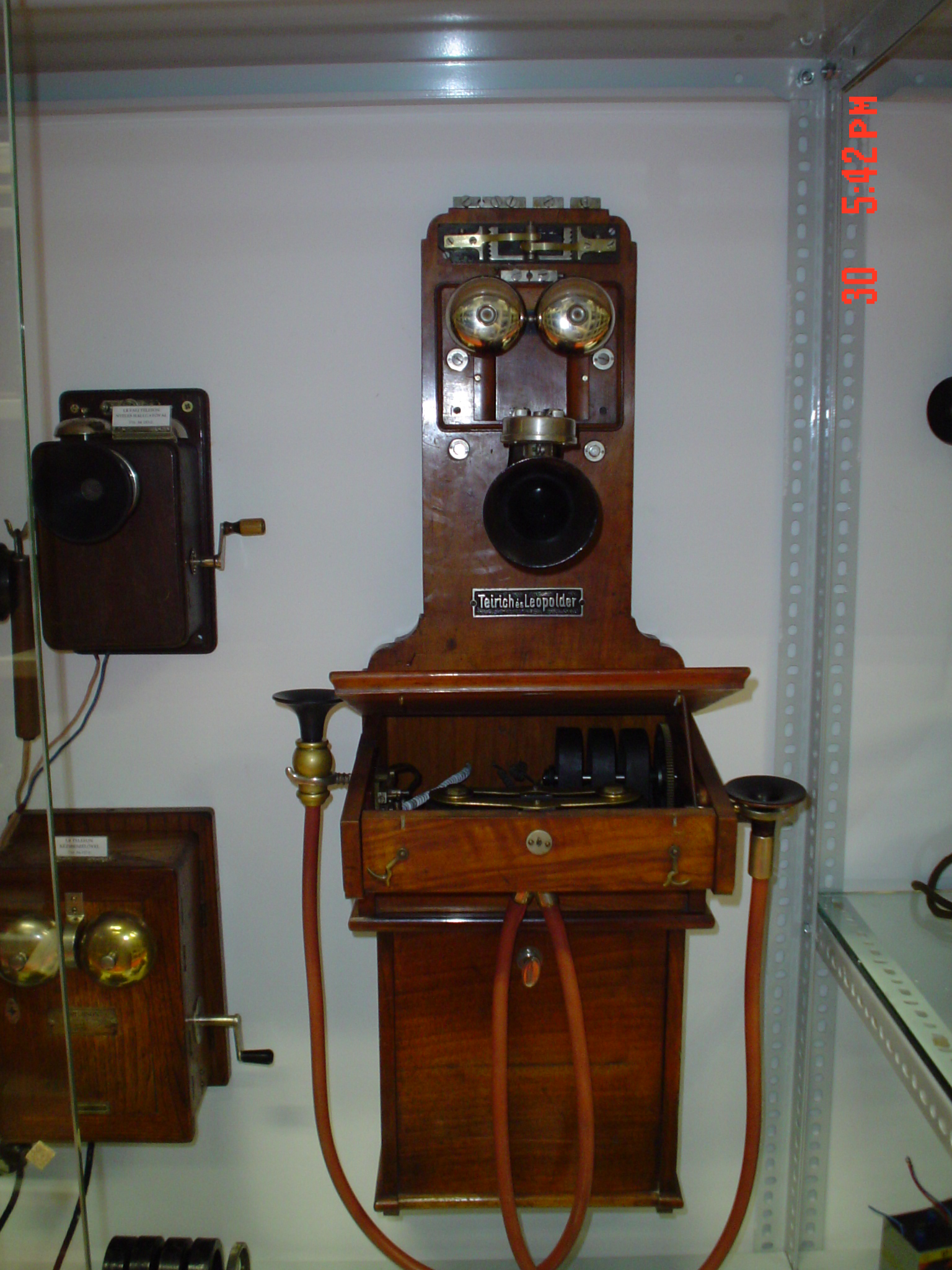 Reĝo de ĉiuj telefonoj (germana)